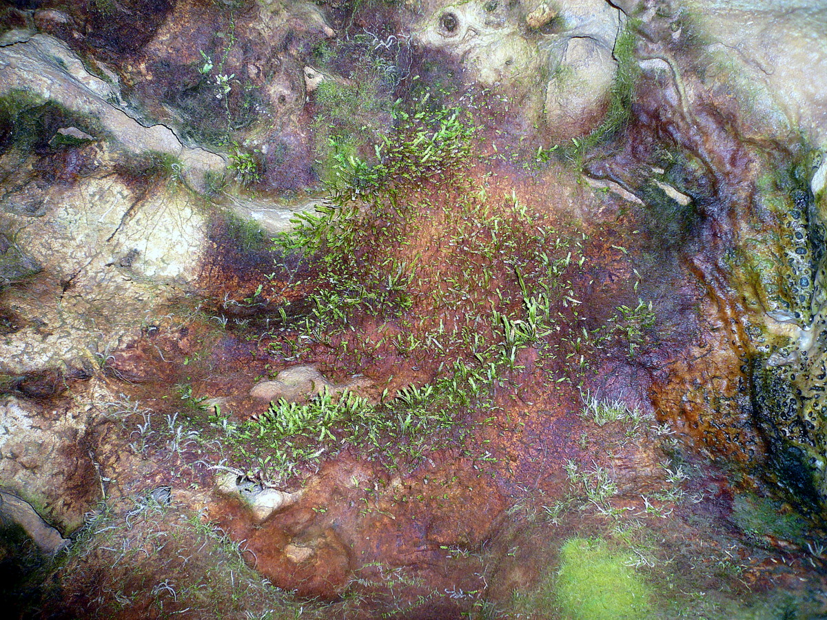 Charlottenhöhle